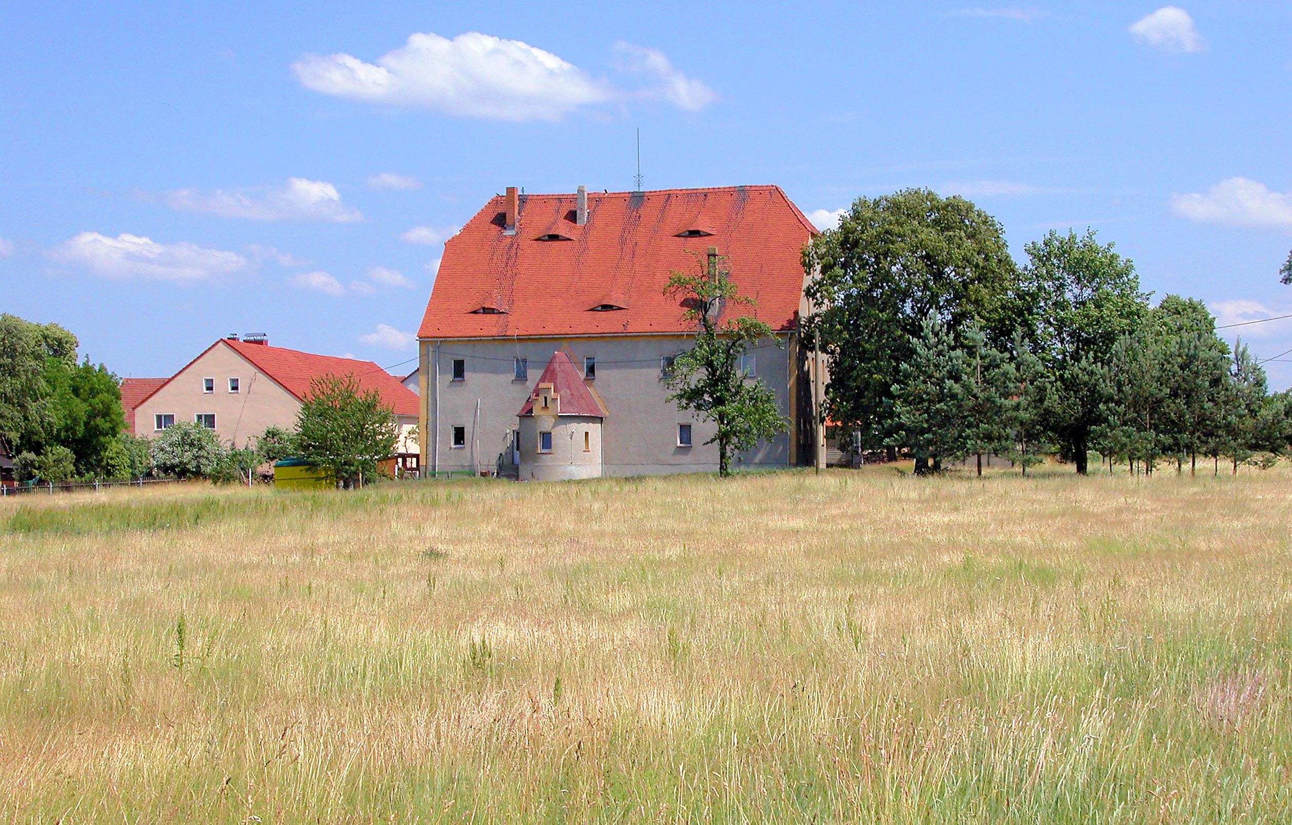 26.06.2006 01561 Tauscha (ab 2016 zu Thiendorf), Unter den Linden 1 (GMP: 51.264859,13.807476): Rittergut, Herrenhaus aus der 2. Hälfte des 17. Jahrhunderts. Sicht von Westen. [DSCN10517.TIF]20060626100DR.JPG(c)Blobelt